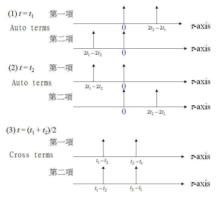 Windowed Wigner Distribution Function_Without_mask